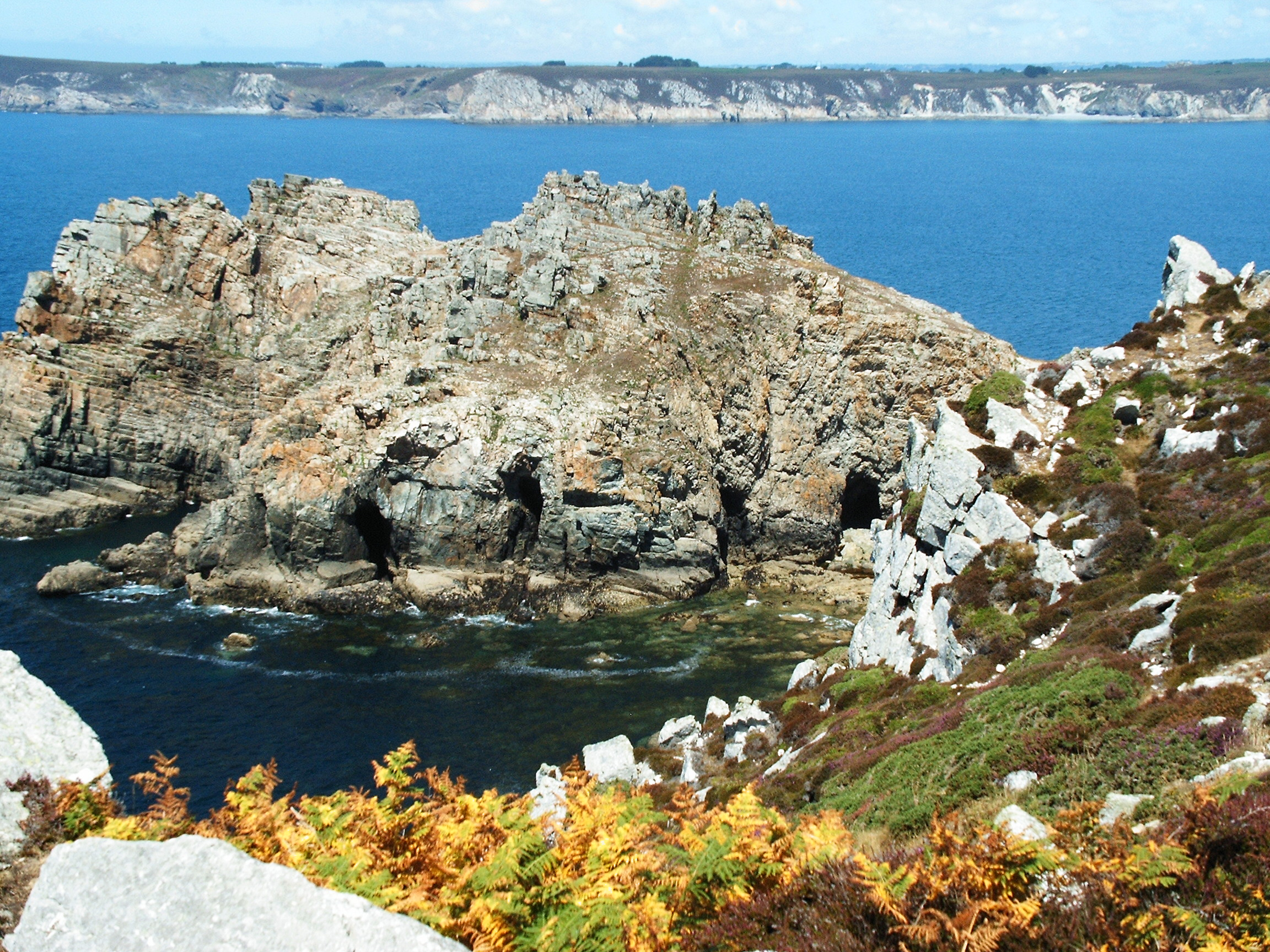 durchbrochene Felsen an der Pointe de Dinan (ou Château de Dinan) (Halbinsel Crozon / Bretagne)